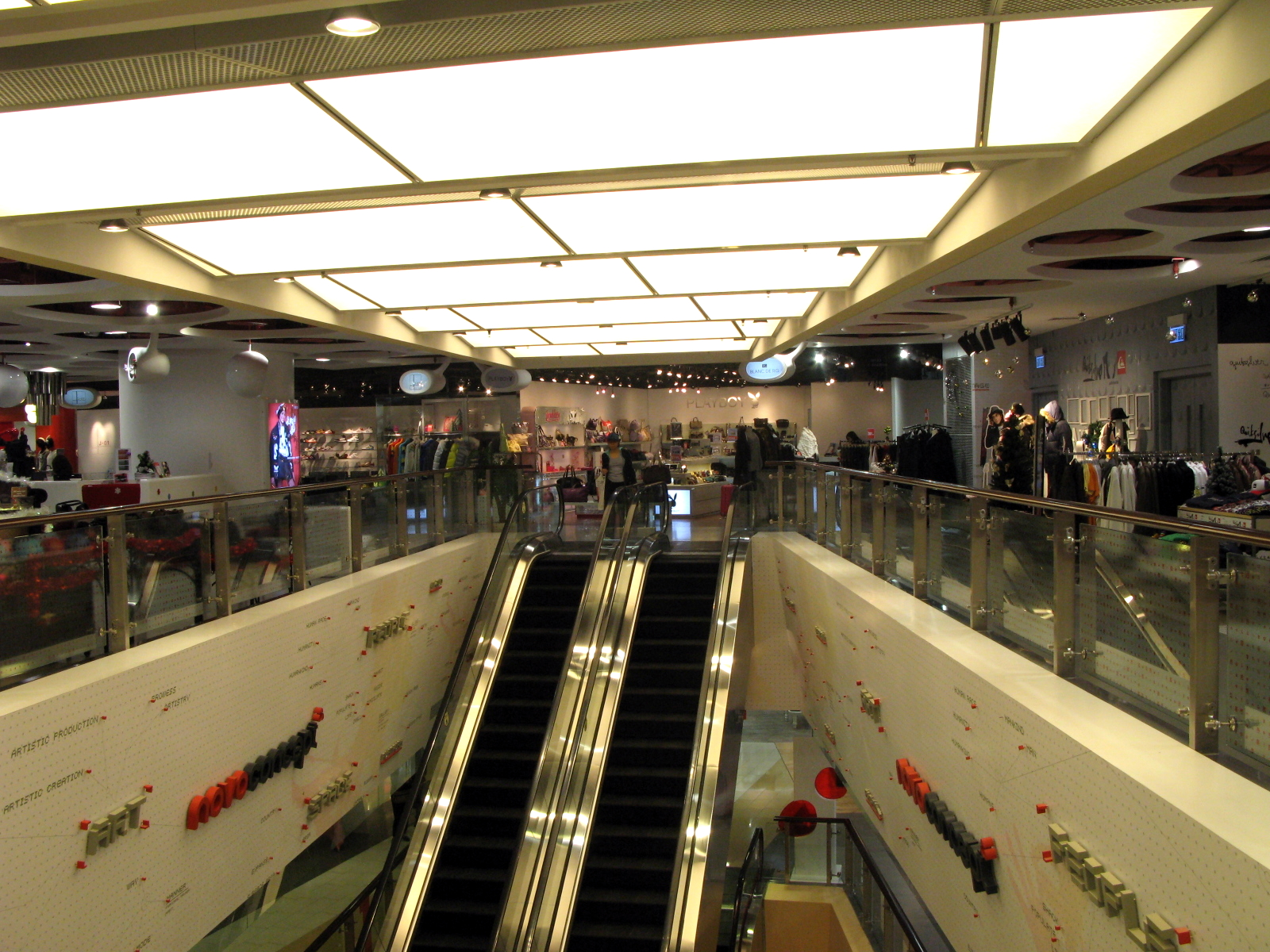 HK MegaBox novo concept store